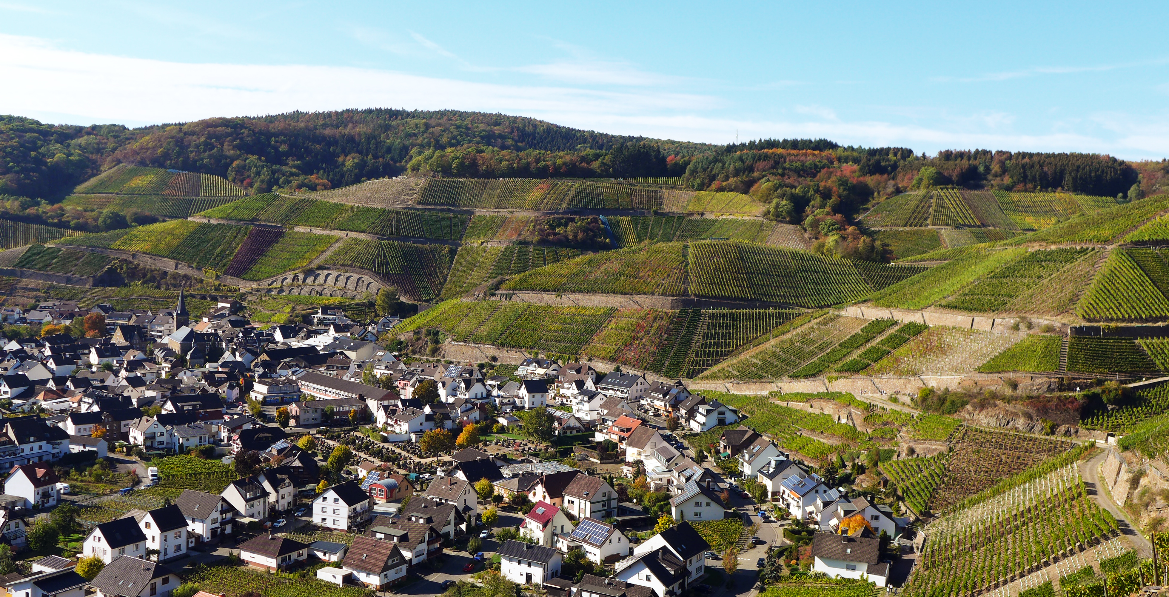 Dernau - Panorama